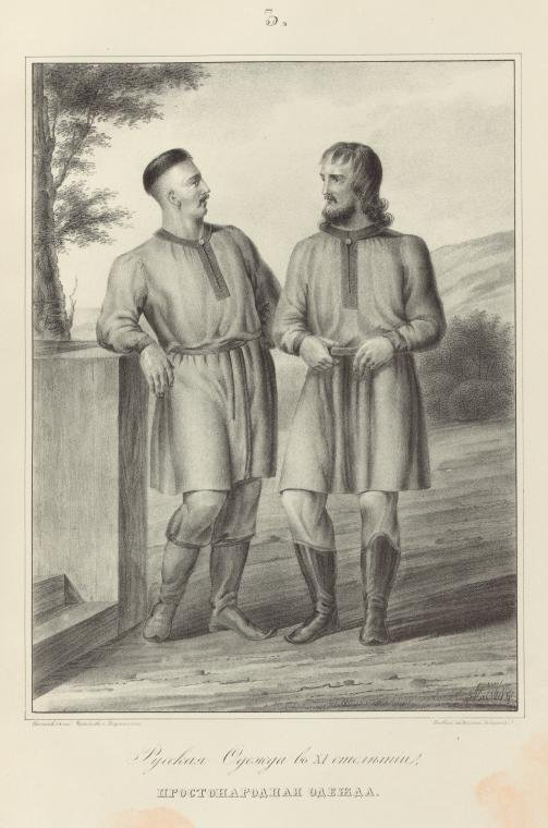 Літографія. Народне вбрання 9 ст.